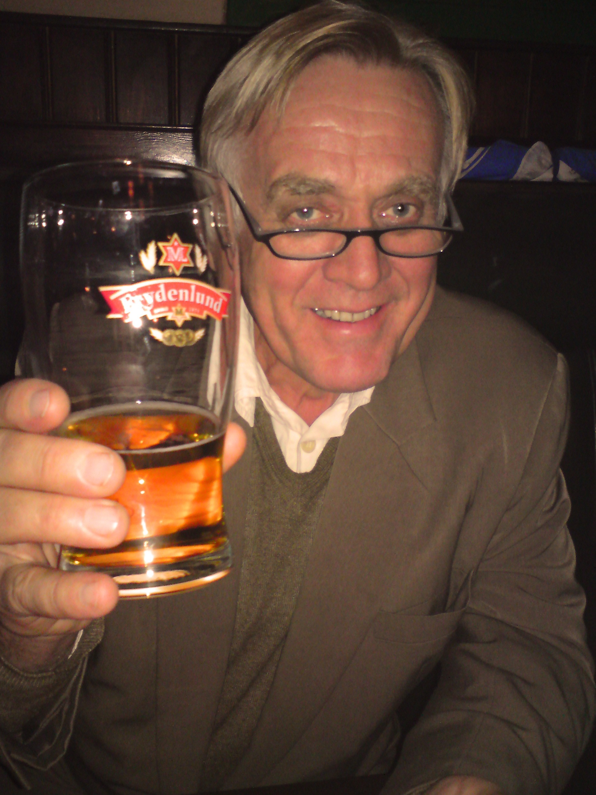 Norsk (bokmål): Kristian Skjølaas